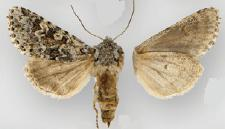 Psammopolia arietis female